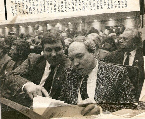 Опубликовано в Японском журнале. Съезд народных Депутатов СССР.